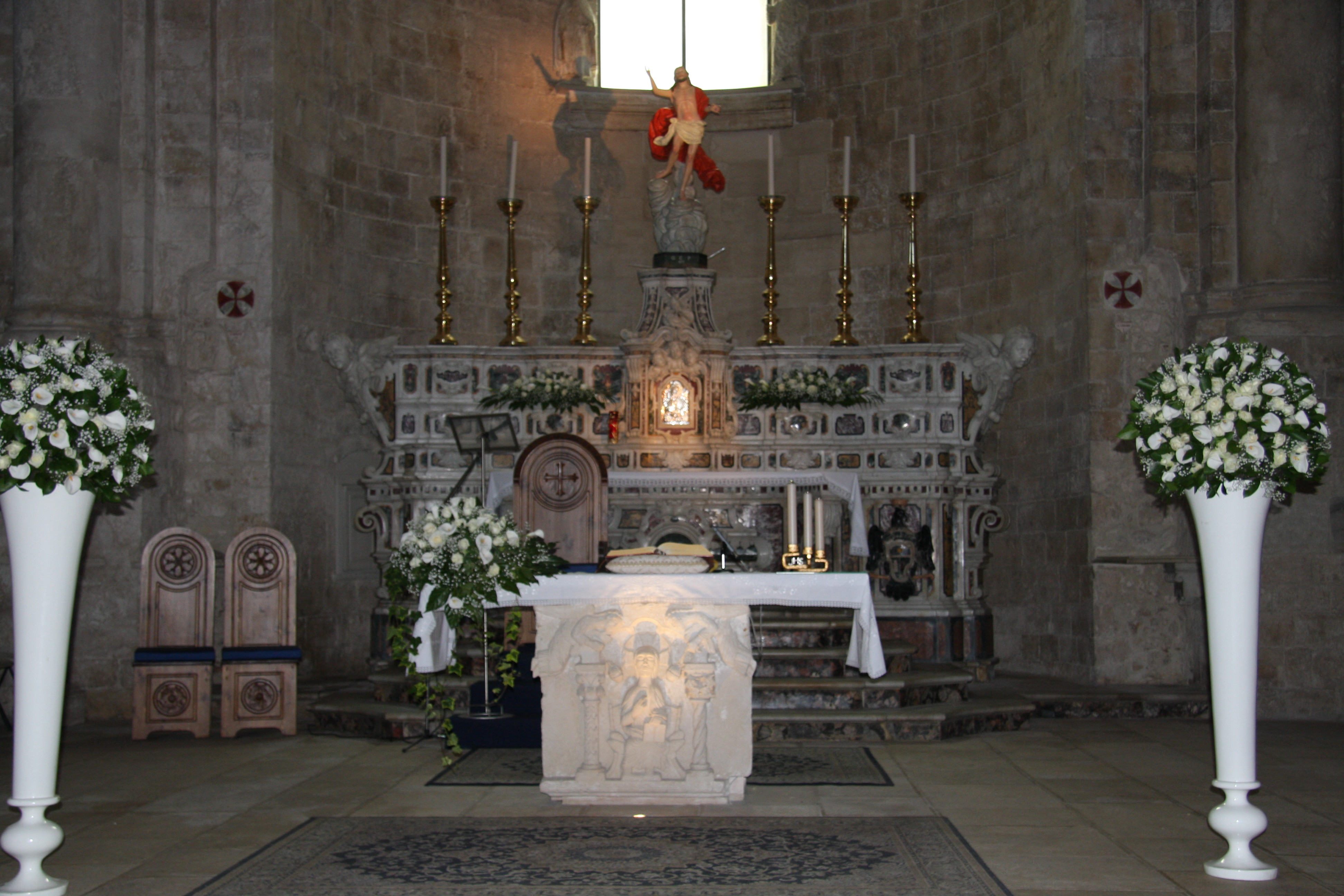 autel de la Cathédrale Saint-Conrad de Molfetta